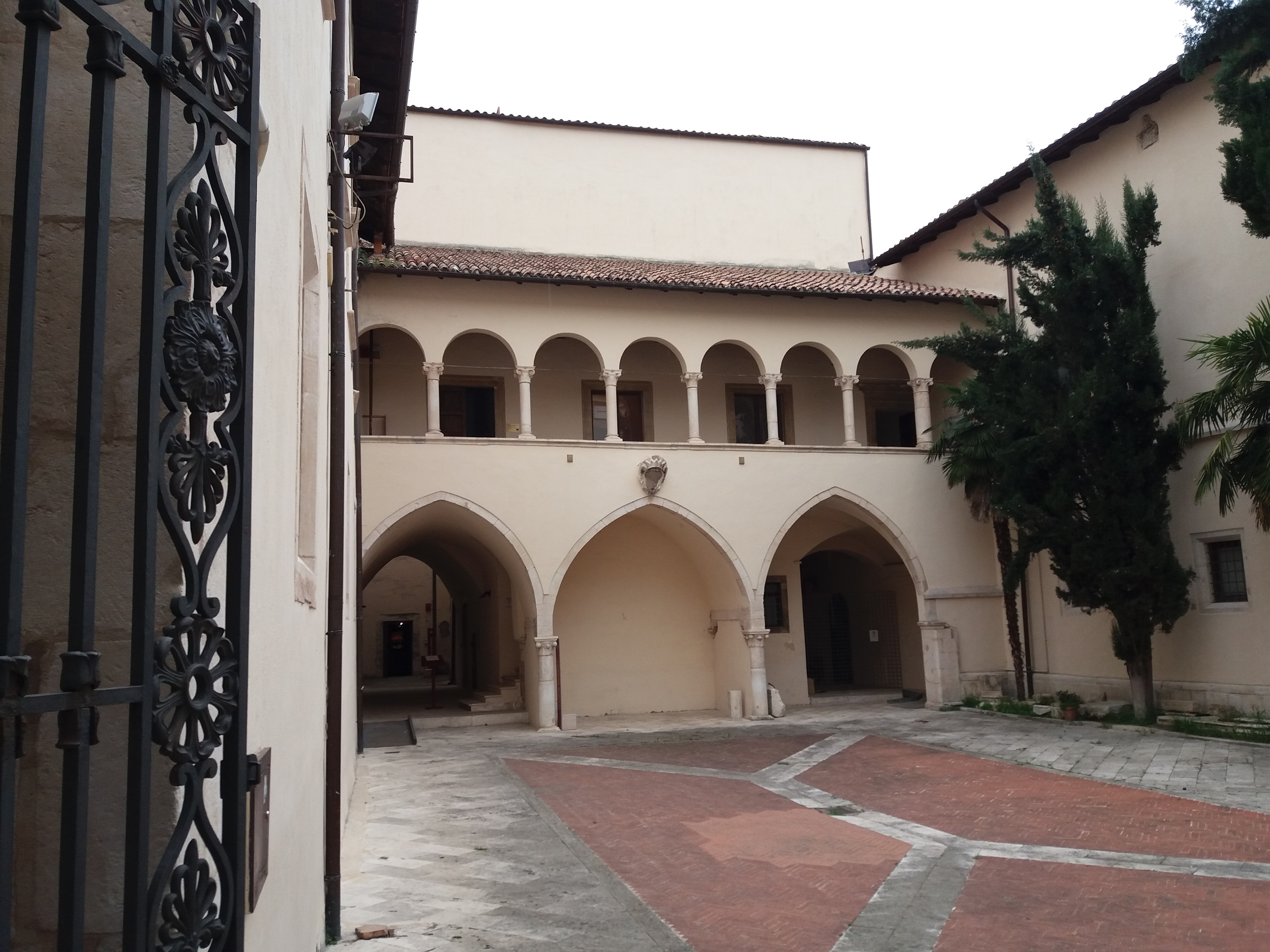 Sulmona: Museo civico